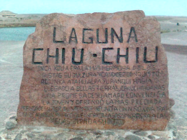 Chiu Chiu